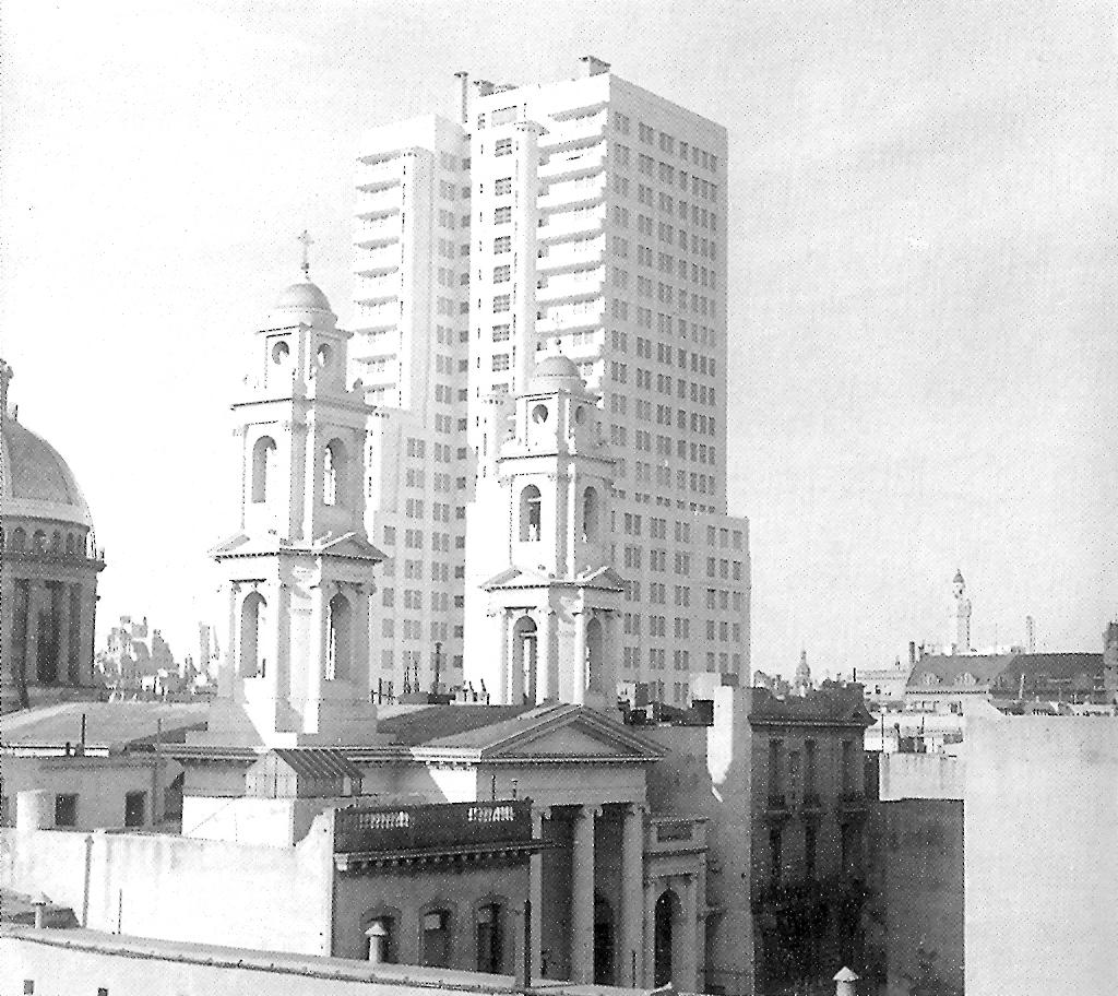 Edificio del Ministerio de Obras Públicas (1936, hoy Ministerio de Salud) visto desde el oeste. Al frente, Iglesia de Nuestra Señora de Monserrat (1859)